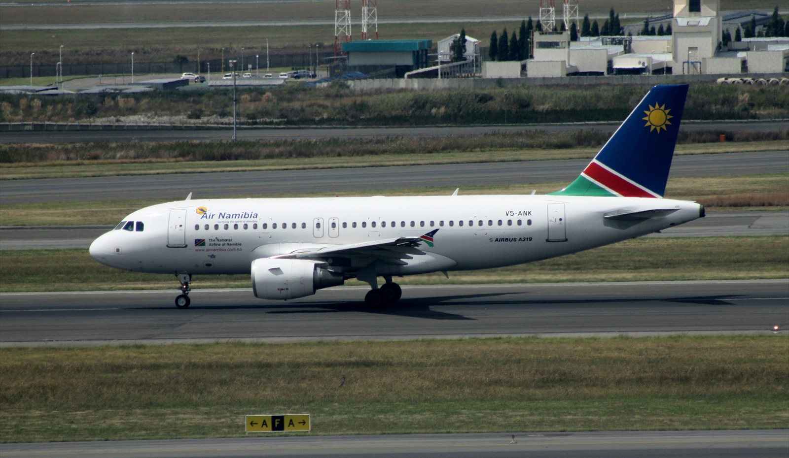 Air Namibia A319-112 V5-ANK